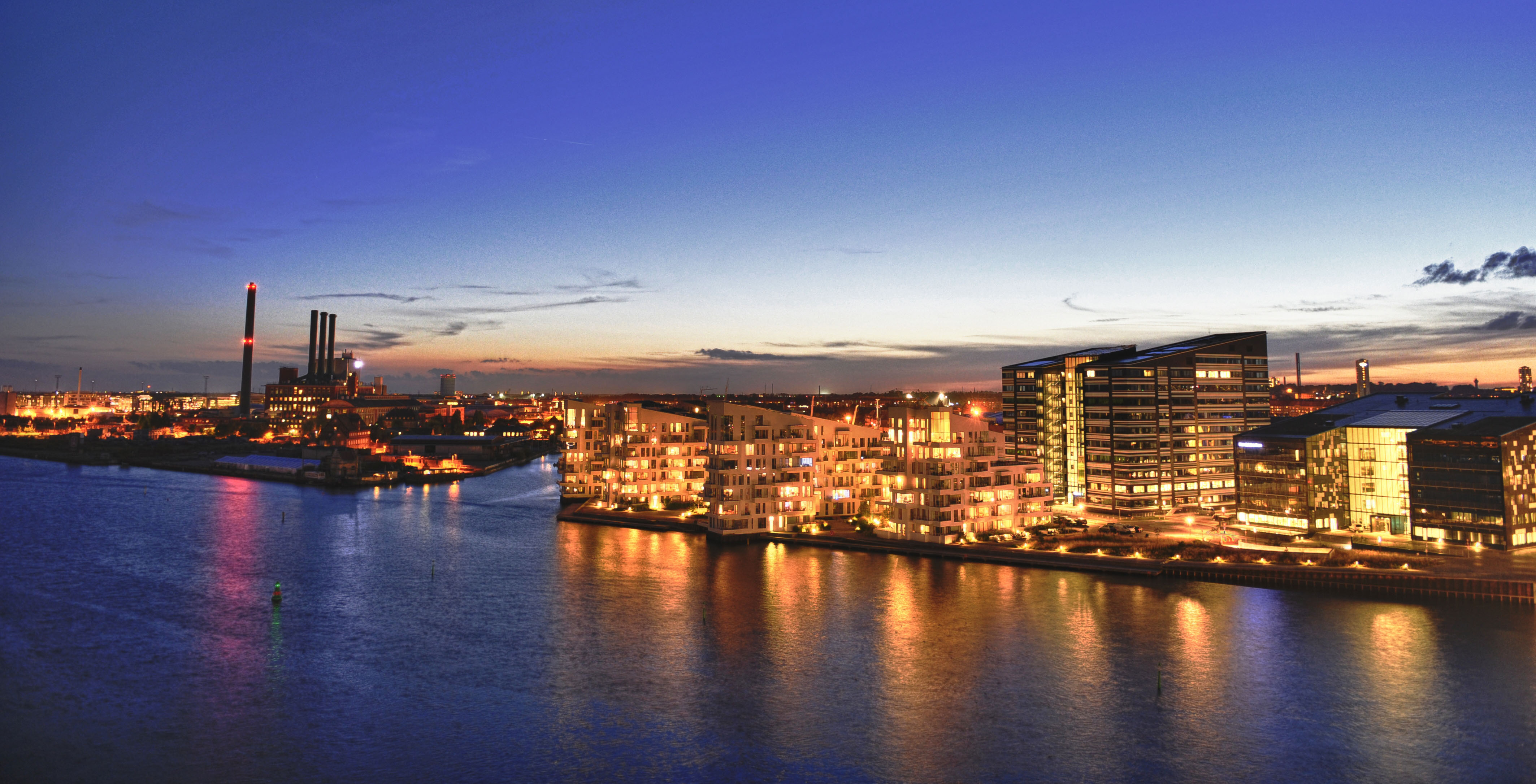 Havneholmen i København hvor Skanska har bygget kontorene Tower, Atrium, Plaza, Pandora samt Cph Highline